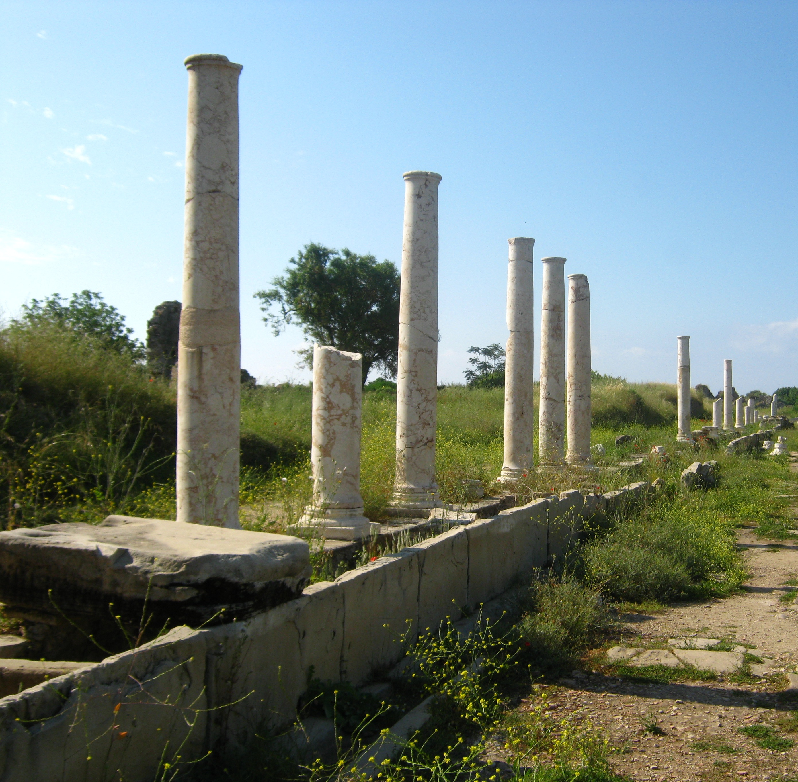 Сіде. Водовідний канал на малому колонному проспекті.